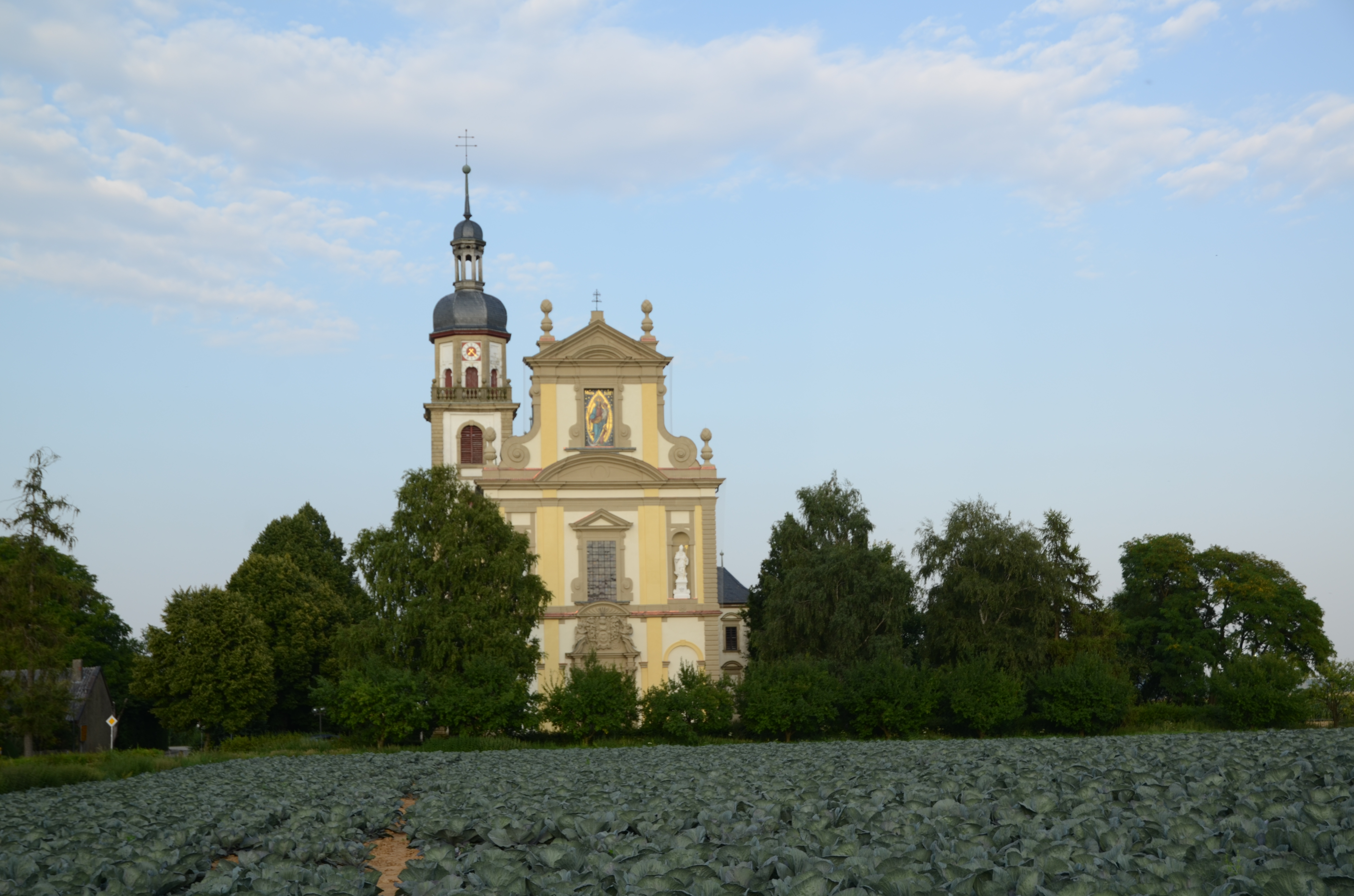 Wallfahrtskirche Fährbrück